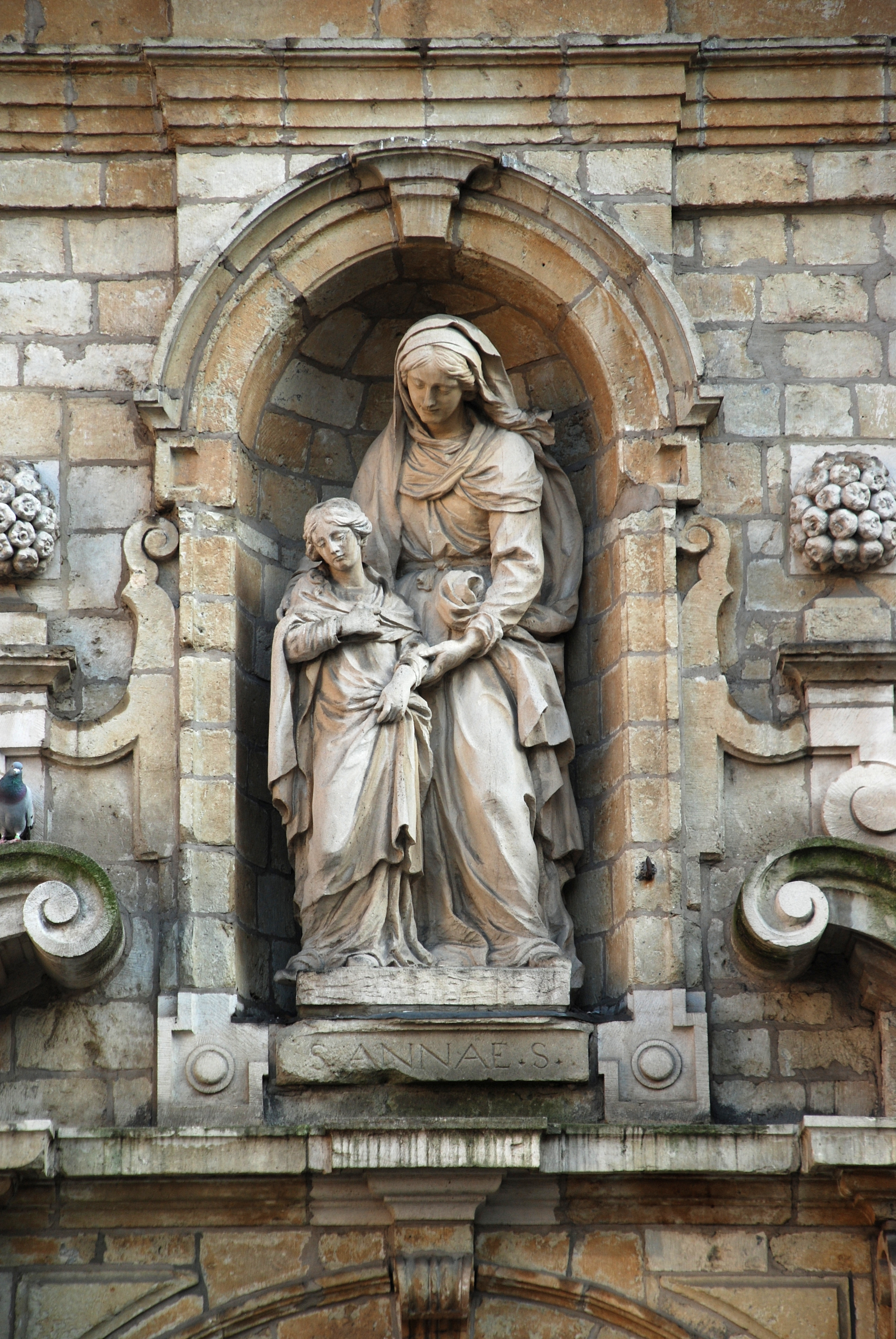 Belgique - Bruxelles - Chapelle Sainte-Anne de Bruxelles